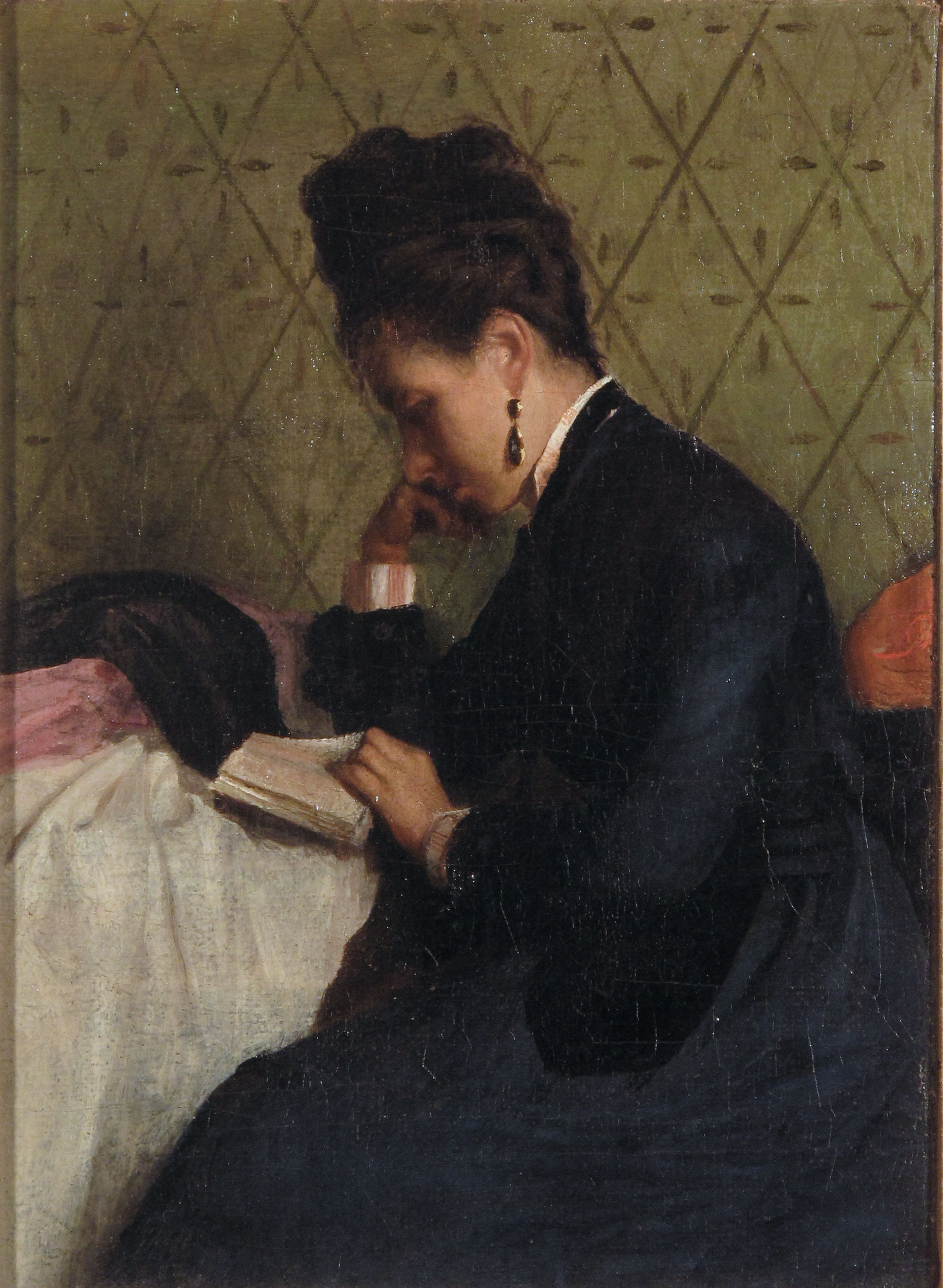 La Lettura